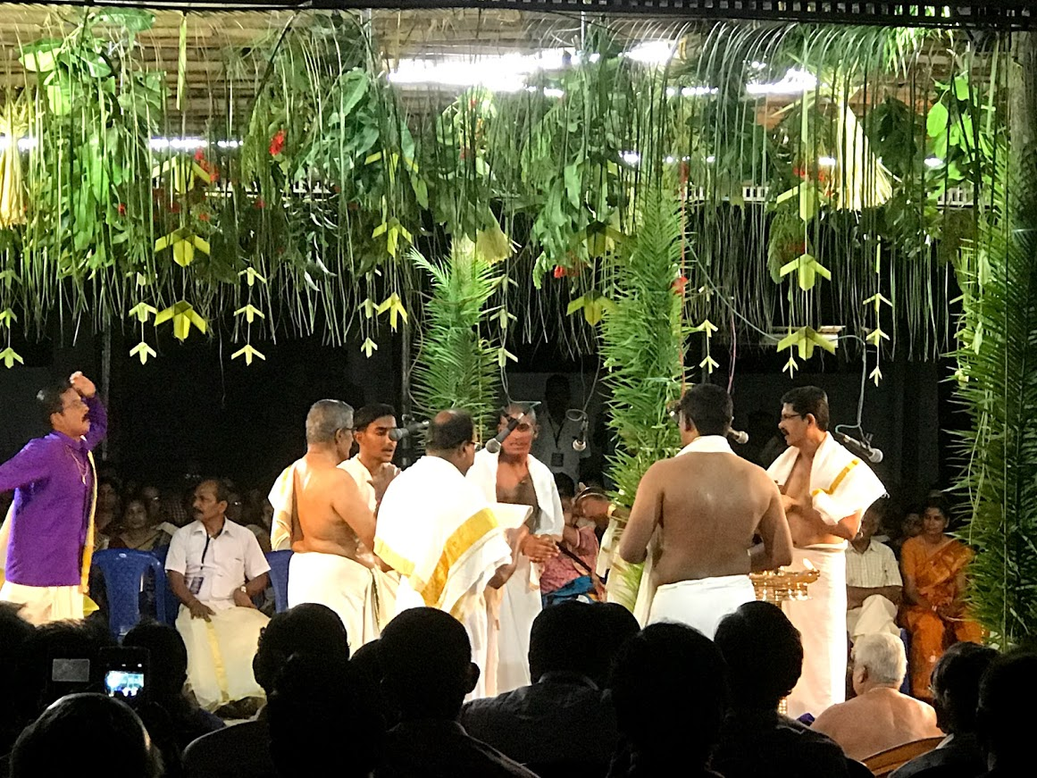 മലമക്കളി